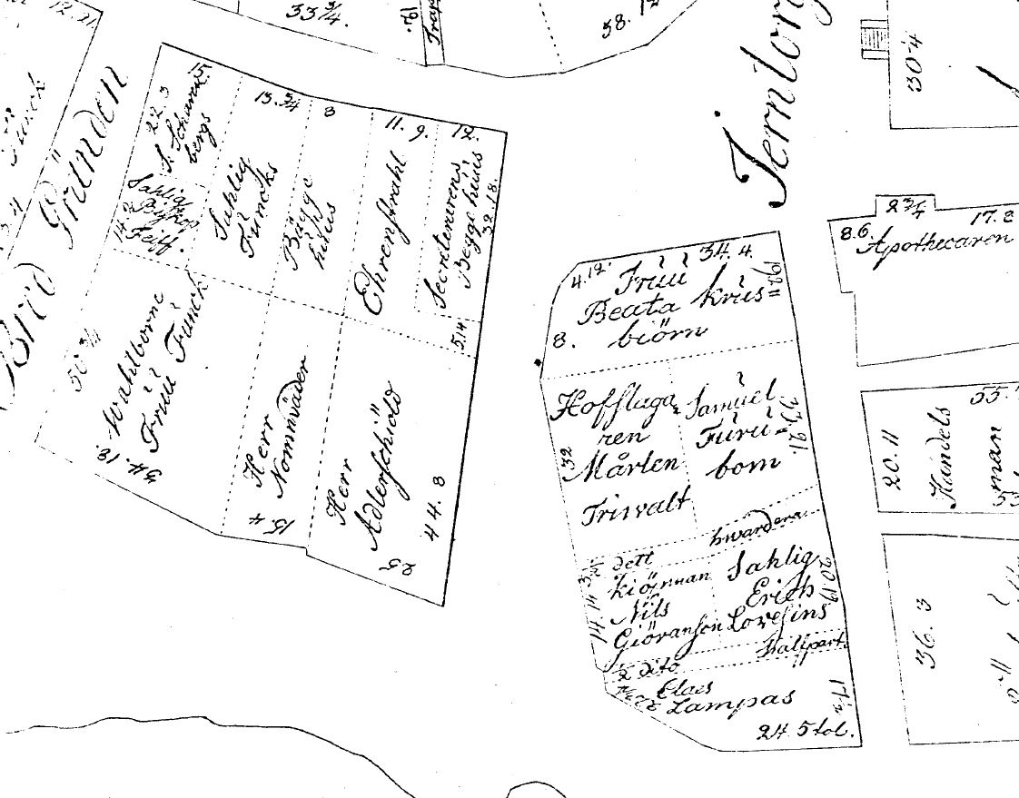 Kvarteren Deucalion (t.v.) och Medusa